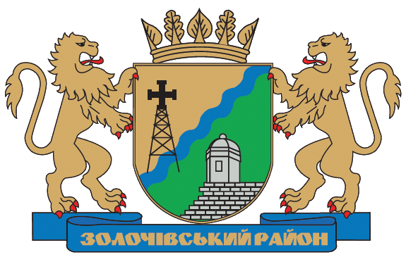 Герб Золочывського району Львывськоъ областы